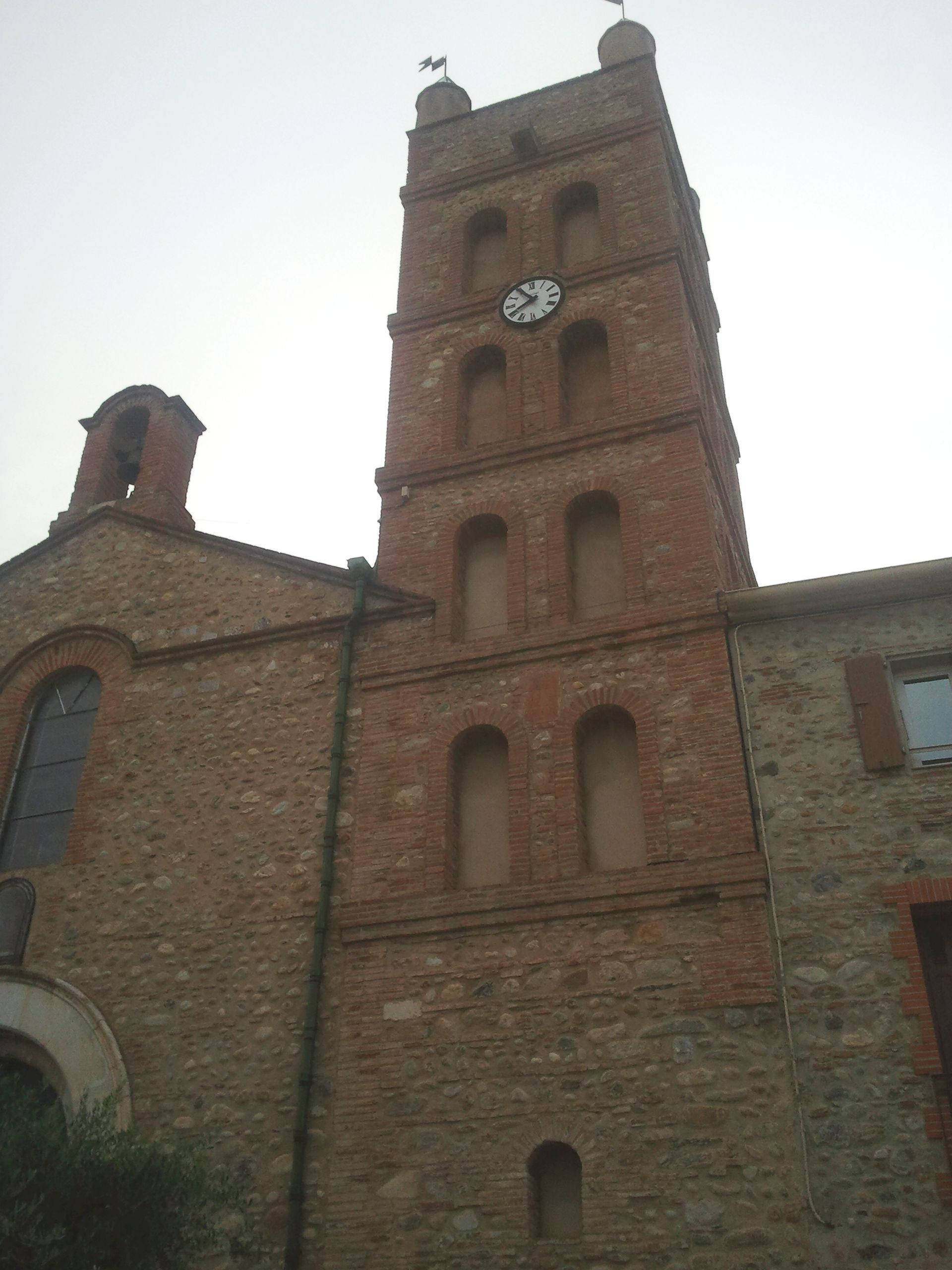 Eglise de Corneilla-la-Rivière